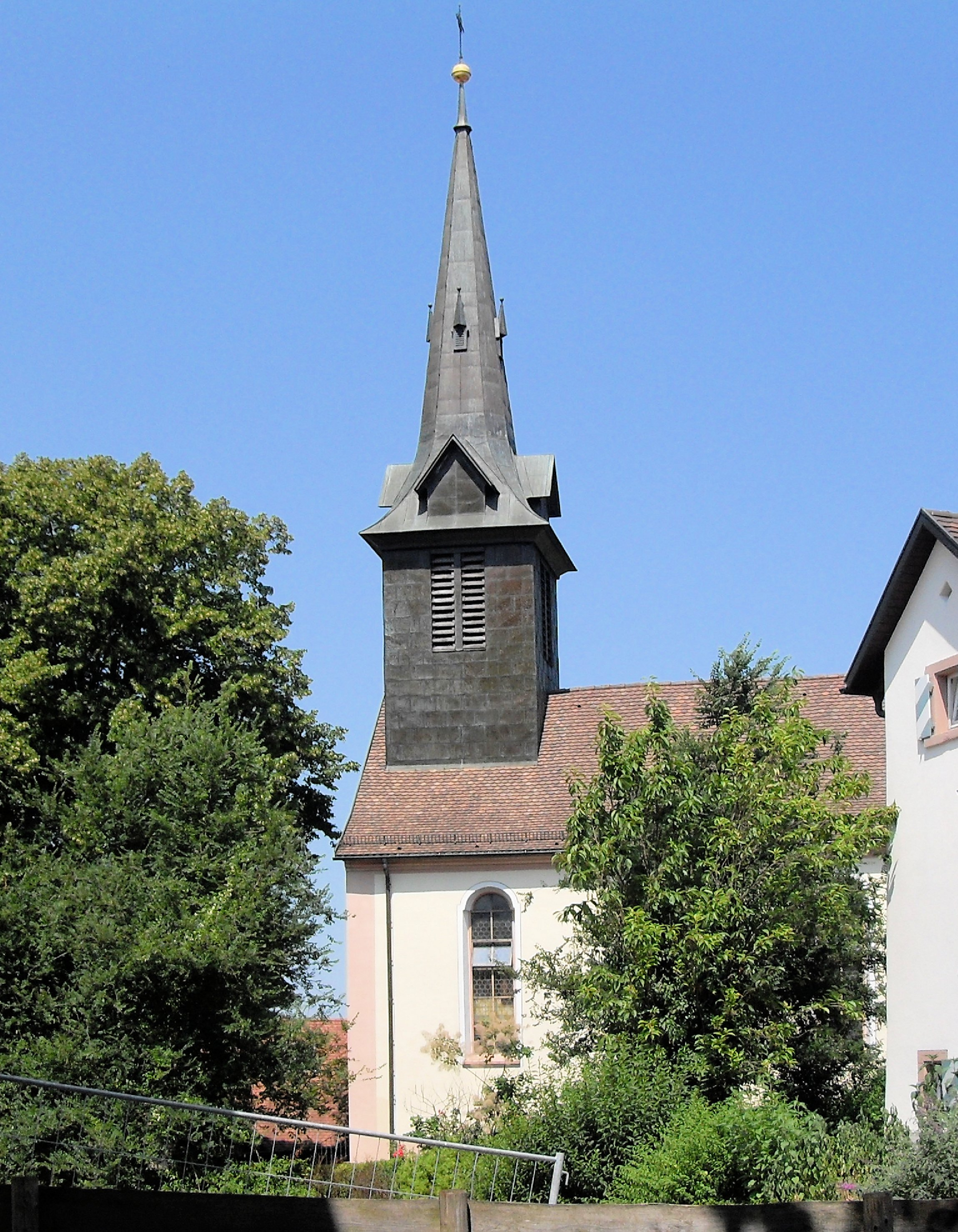 Kirche St. Remigius in Heuweiler, Baden